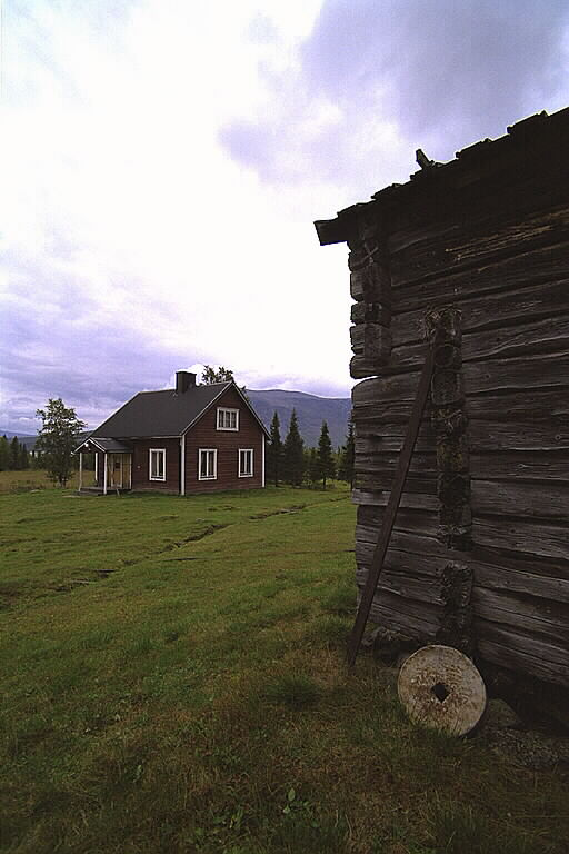 Fjällhemman/nybygge. Laponia Motiv: Aktse Nyckelord: Världsarv Kategori: Nybyggargård/fjällägenhet Fjällhemman/nybygge. Laponia.